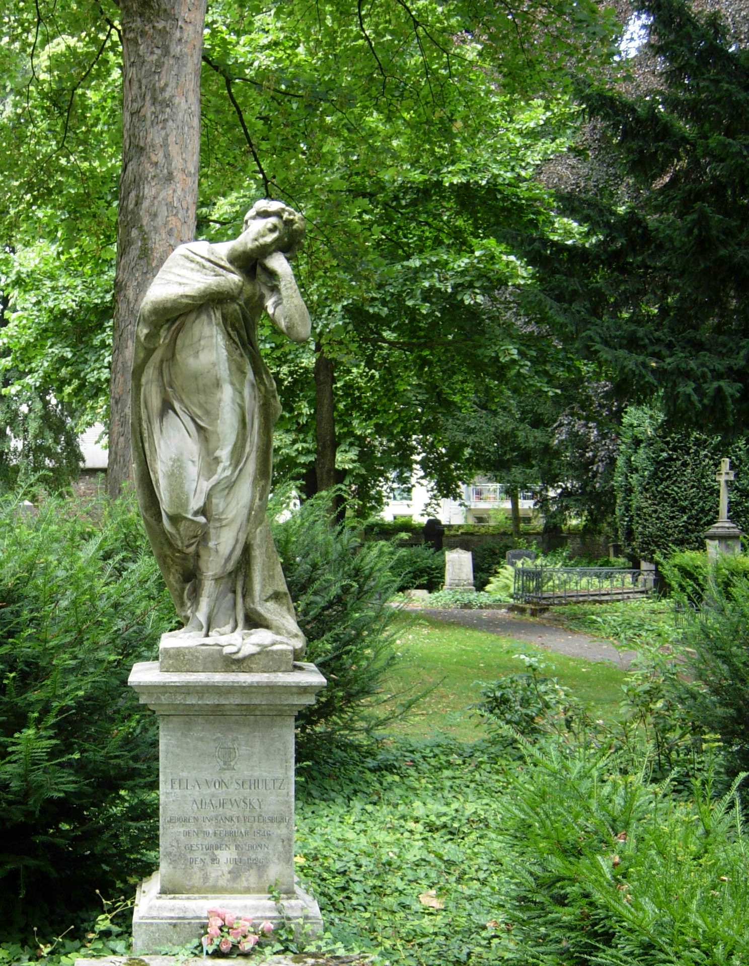 Antonio Dal Zotto (1841 – 1918): Marmorfigur Melancholie über dem Grab der Pianistin, Komponistin und Musiktheoretikerin Ella von Schultz-Adajewsky auf dem Alten Friedhof Bonn; laut Inschrift auf einer Seite des Sockels wurde das Grabmal gesetzt von Benno Geiger (1882 – 1965), einem Neffen der Komponistin, dem österreichischen Kunsthistoriker, Lyriker und Übersetzer (für seine Übersetzungen aus dem Italienischen – vor allem Dante, Petrarca und Pascoli - erhielt er 1959 den Johann-Heinrich-Voß-Preis der Deutschen Akademie für Sprache und Dichtung). Ella vertonte Gedichte ihres Neffen in dem Liederzyklus 24 Präludien für Singstimme und Klavier; Quelle zu Dal Zotto: Benno Geiger, Memorie di un Veneziano (Vallechi Editore, Florenz 1958); Geigers Text (Seite 14) lautet übersetzt: „zu ihrer [Ellas] Erinnerung ließ ich ein Denkmal auf dem Bonner Friedhof errichten, mit einer Marmor-Statue, die Melancholie (Malinconia) darstellend, des Bildhauers Antonio Dal Zotto, des Schöpfers der Denkmäler für Tartini und Goldoni“ (gemeint ist die Goldoni-Statue in Venedig, die Statue in Florenz stammt von Ulisse Cambi)